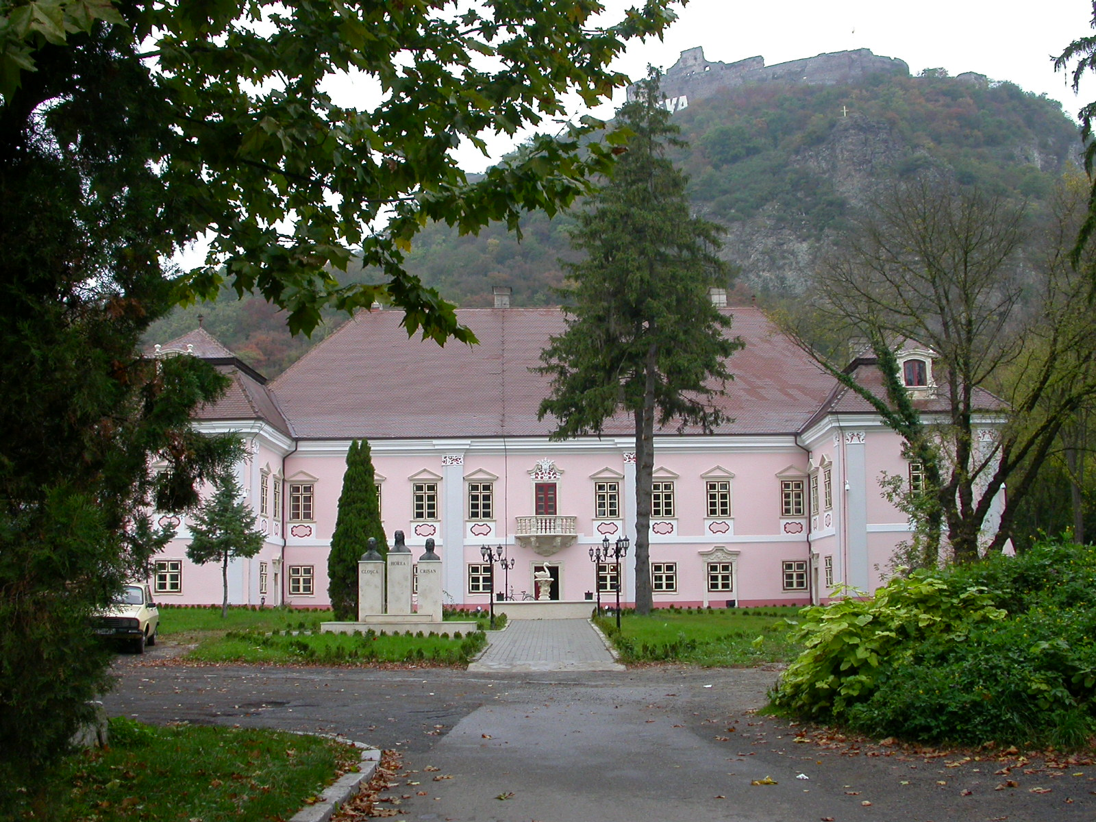 Magna Curia (Castelul Bethlen), azi Muzeul Civilizației Dacice și Romane Deva, sec. XVI, transf. sec. XVII-XVIII